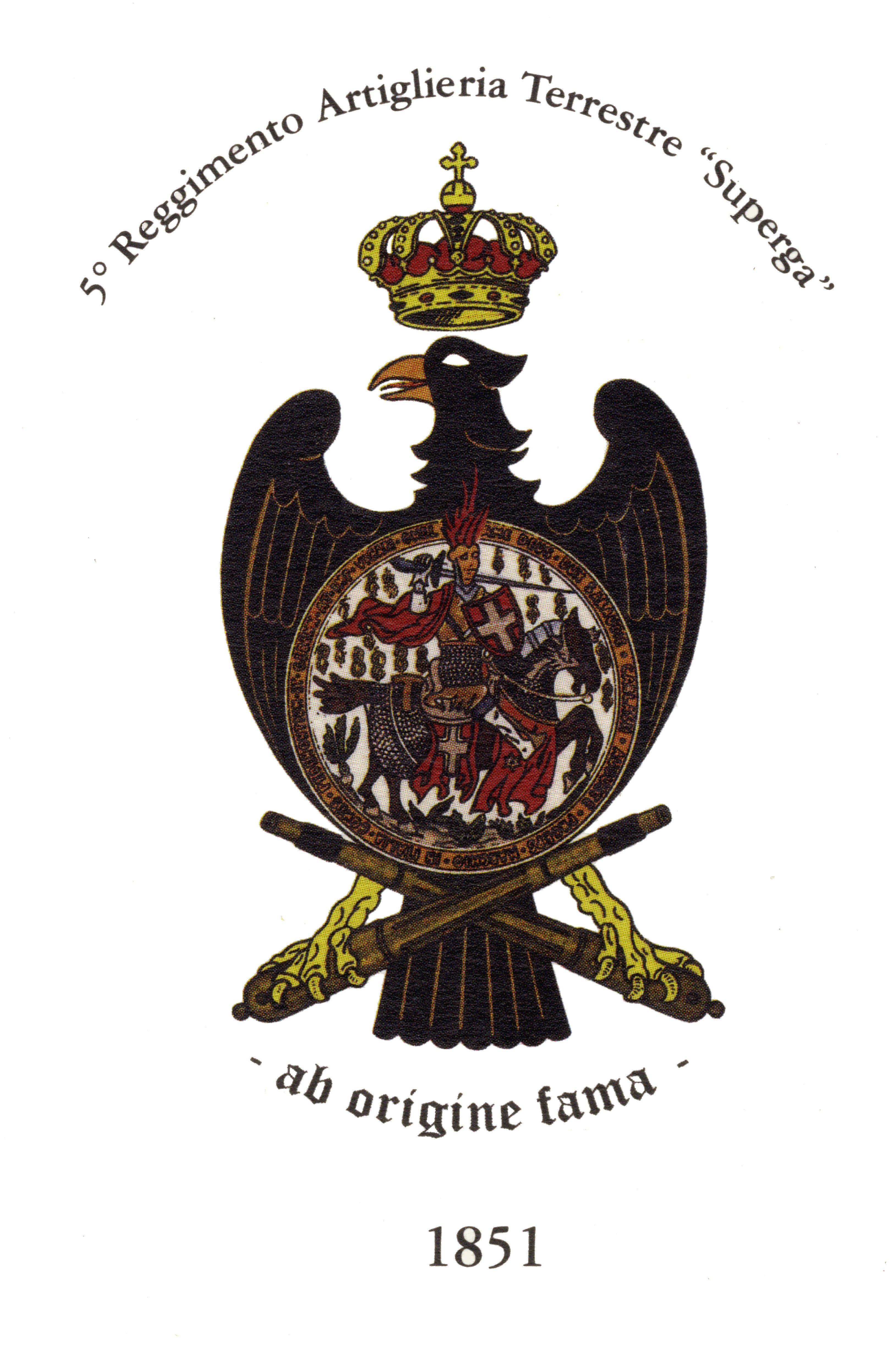 stemma arldico storico del 5 Reggimento artiglieria da Campagna